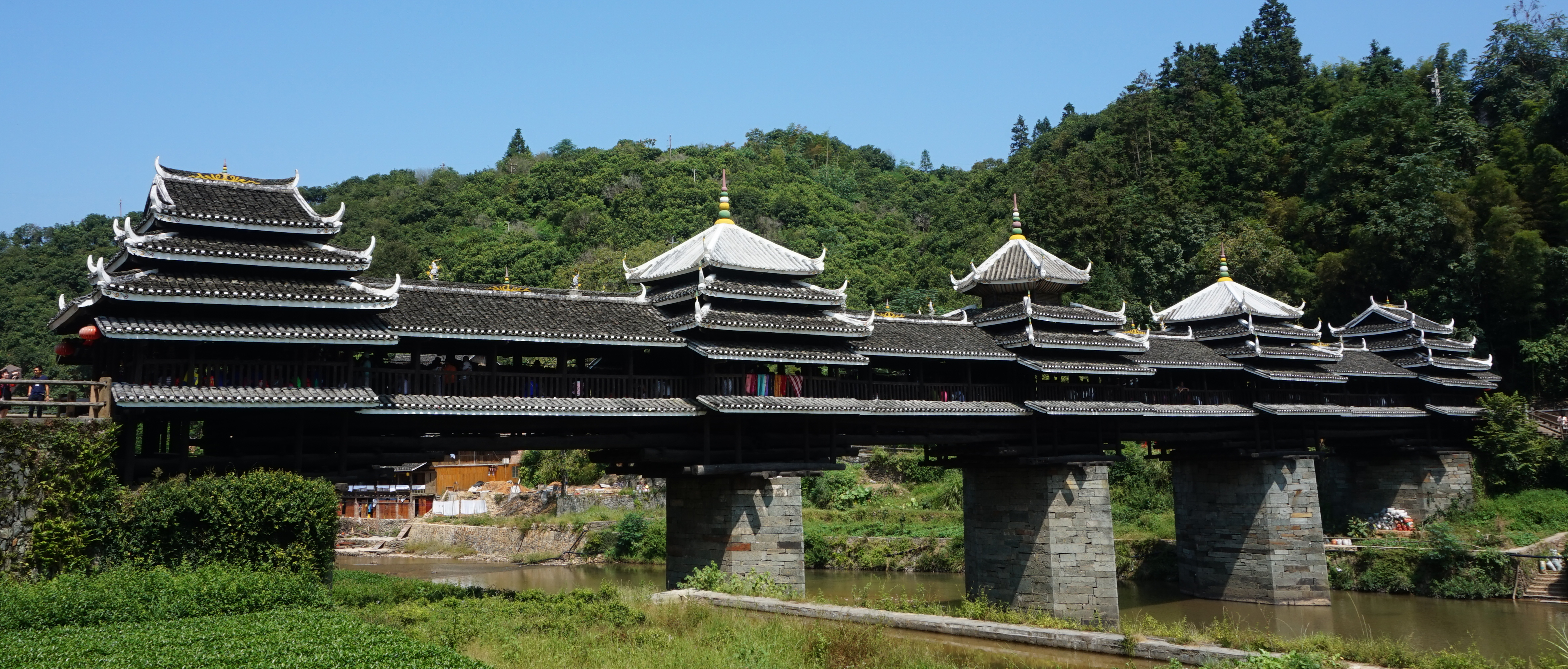 程阳永济桥。